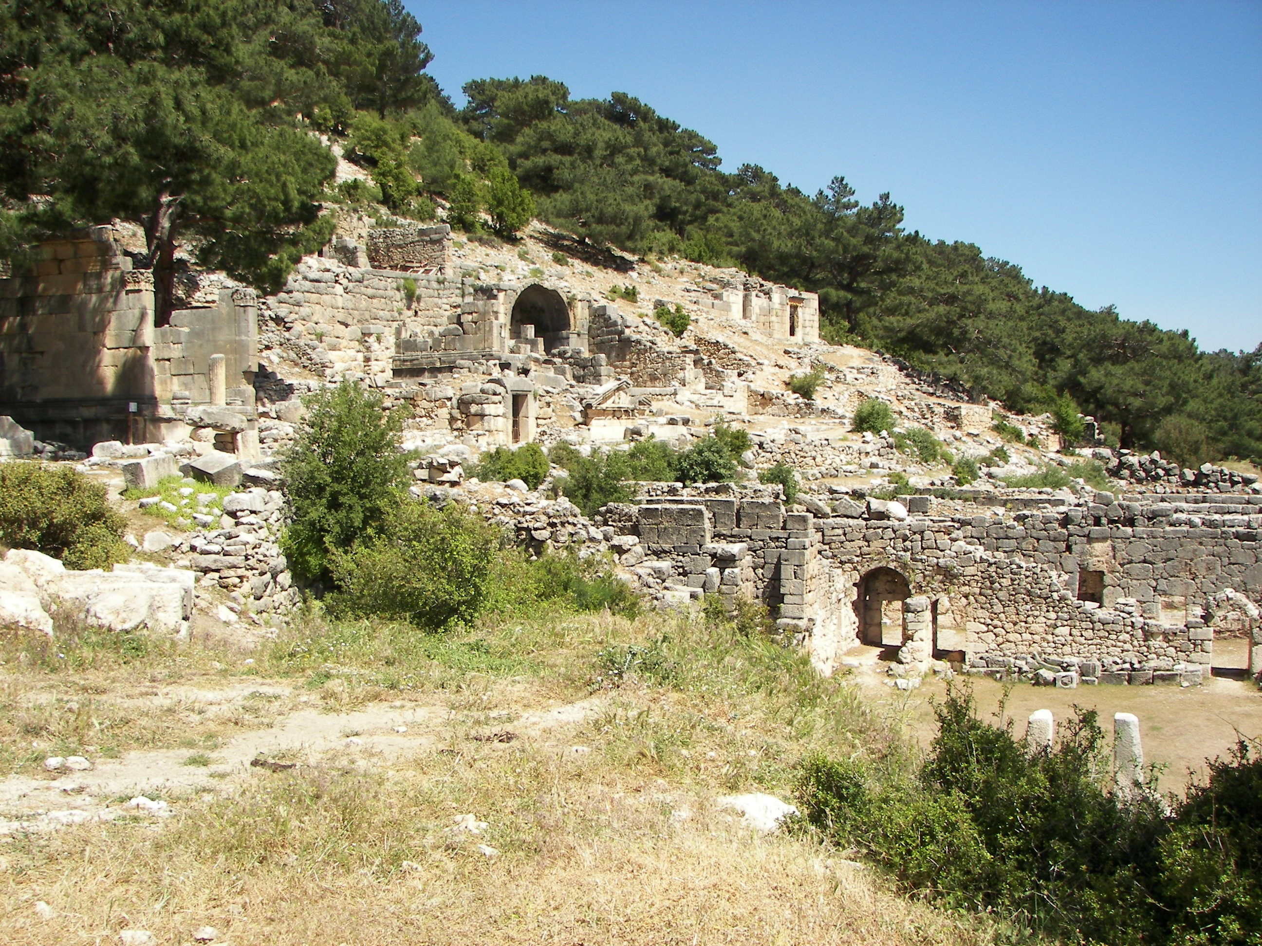 Arykanda